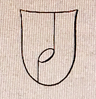 Logo der Peter-Presse bzw. des Druckhaus Aufwärts in Leizpig und Darmstadt